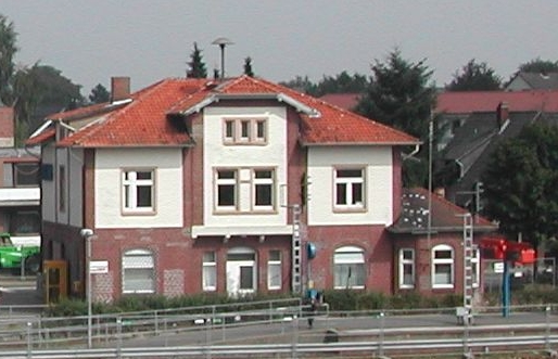 Dieses Foto, mit einer Digitalkamera aufgenommen, zeigt das alte Bahnhofsgebäude. Dieses wurde bisher (August 2006) nicht abgerissen, der Bahnhof selbst durch einen modernen, unterirdischen zweigleisigen Bahnhof ersetzt.